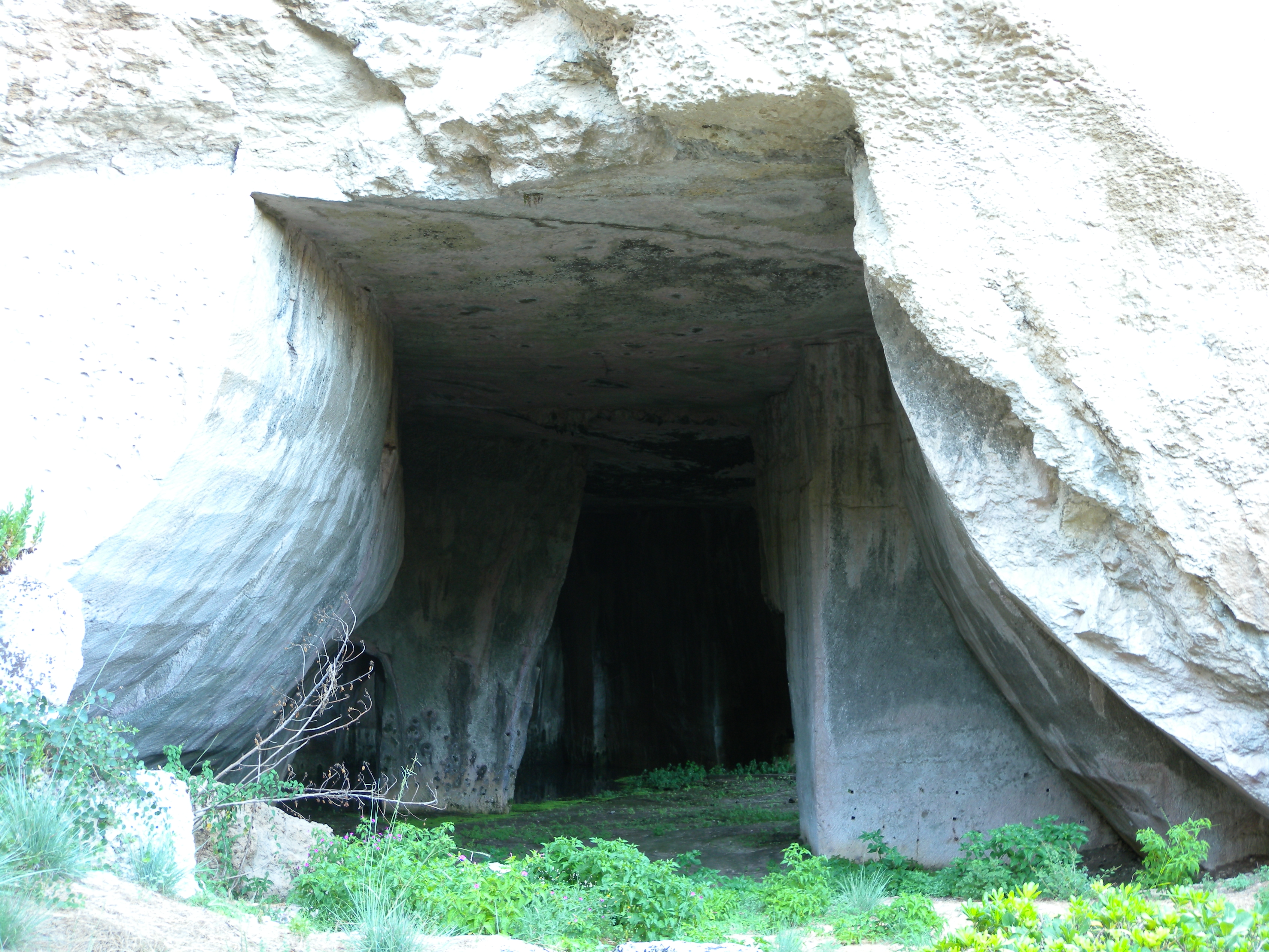 Latomia Neapolis - Siracusa